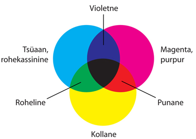 CMYK värvimudel